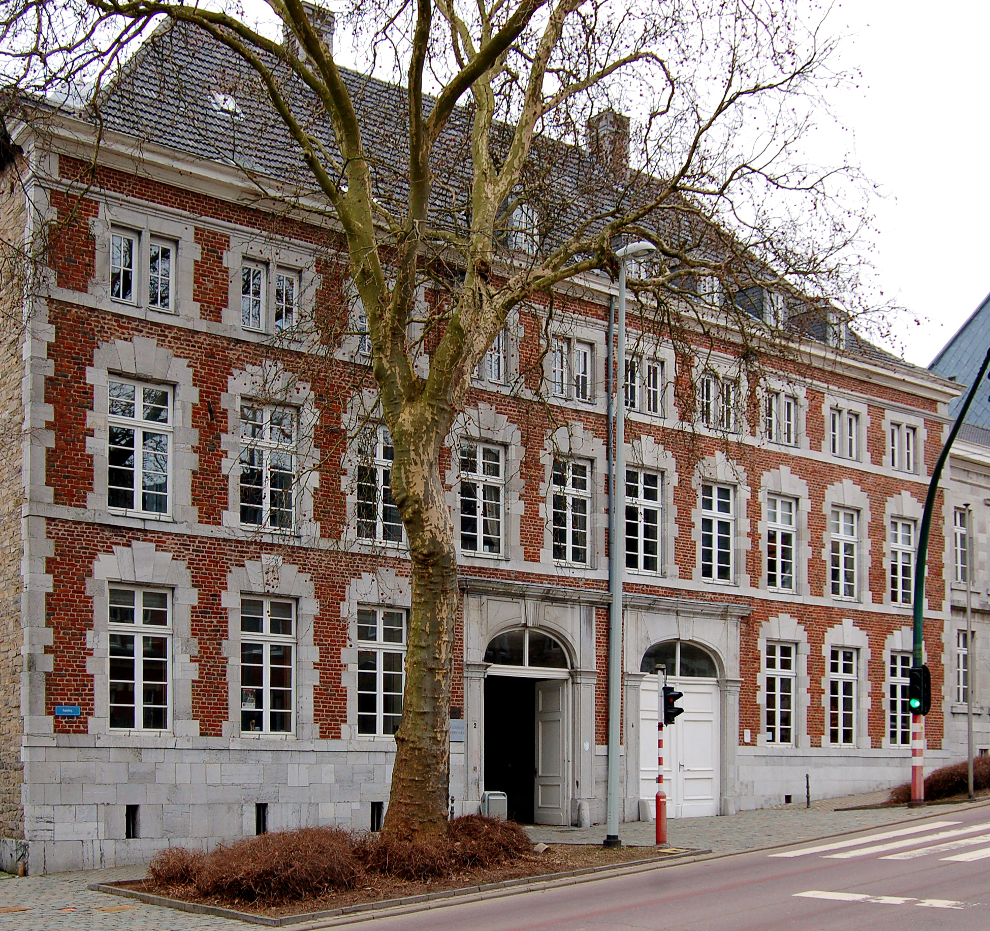 Patrizierhaus Rehrmann, erbaut von Laurenz Mefferdatis, Sitz des Staatsarchivs und Eingang der Pater-Damian-Sekundarschule Eupen